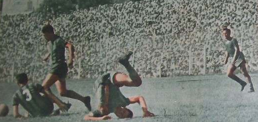 Partido del 5 de abril de 1953, Rosario Central 0-Boca Juniors 0. Miguel La Rosa (RC, de pie) se lleva la pelota luego de que Federico Vairo (RC, en el piso) se la quitara al delantero Roberto Rolando (BJ, a la derecha, de cabeza).